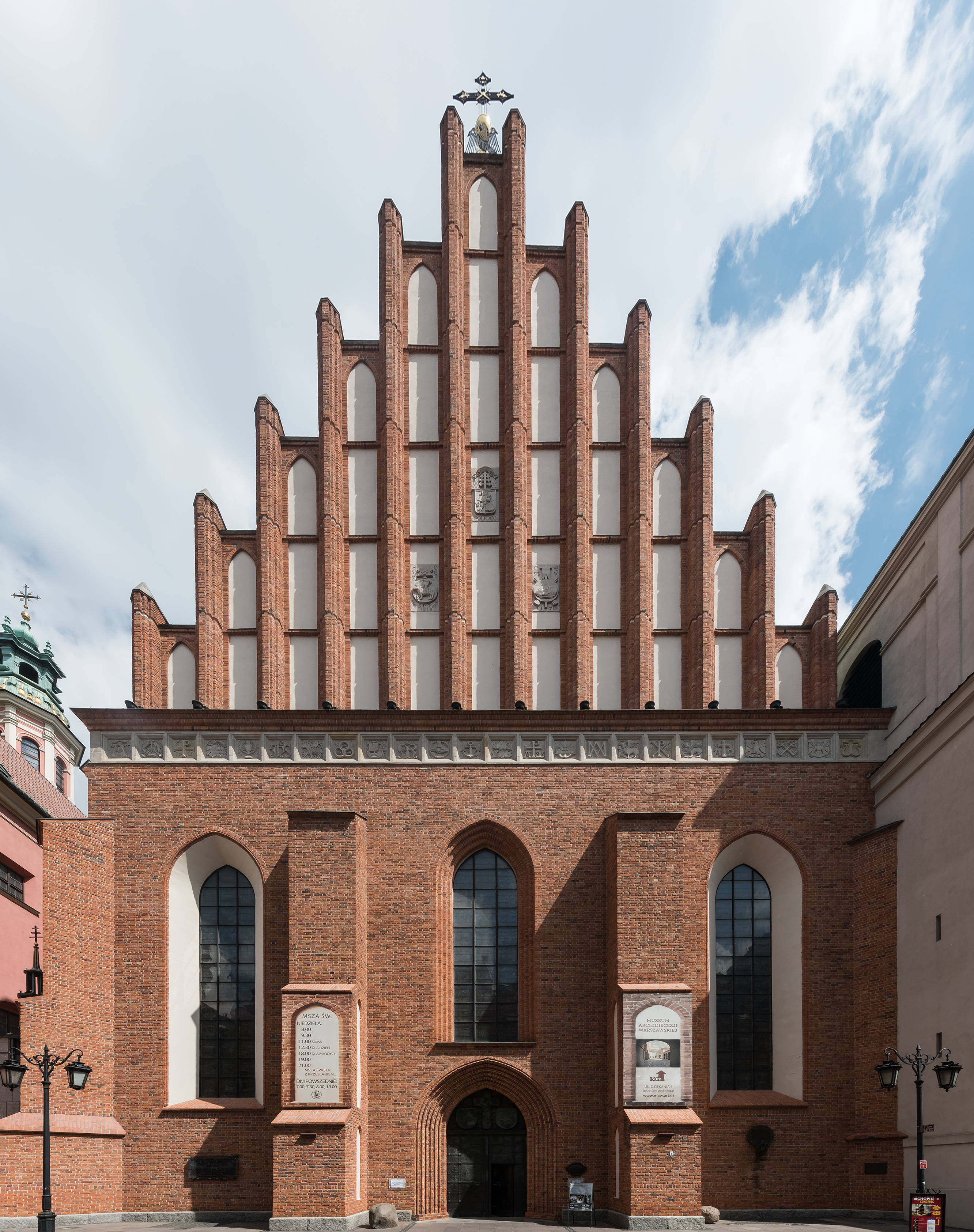 Bazylika archikatedralna św. Jana Chrzciciela przy ul. Świętojańskiej w Warszawie